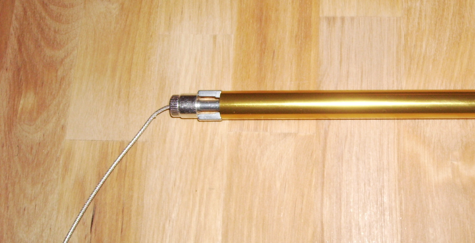 Lawinensonde, oberes Ende (Spannvorrichtung) Avalanche probe, upper end (tightening)